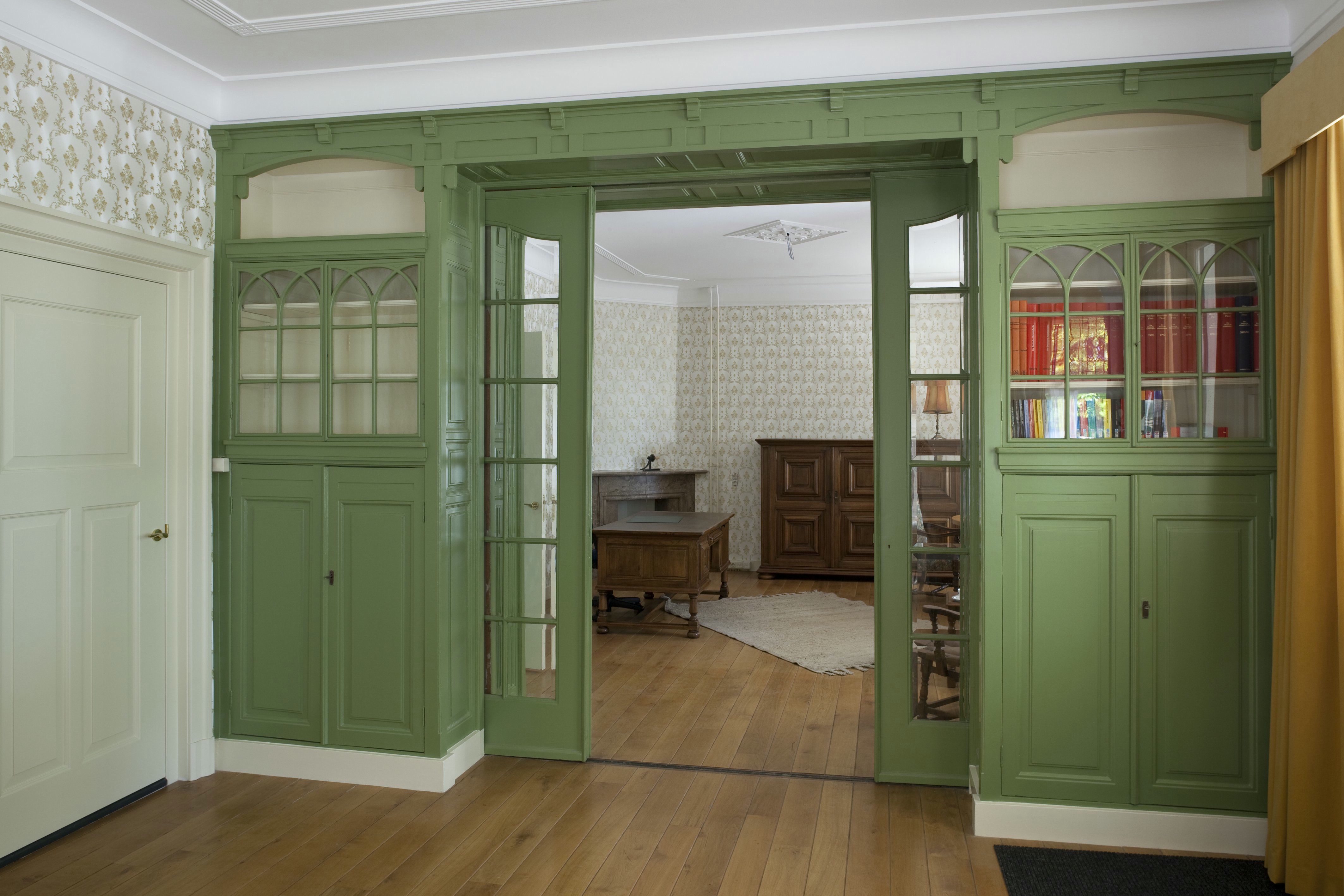 De Nijhorst: Interieur kamer en-suite links voor, overzicht van scheidingswand met kasten en schuifdeuren